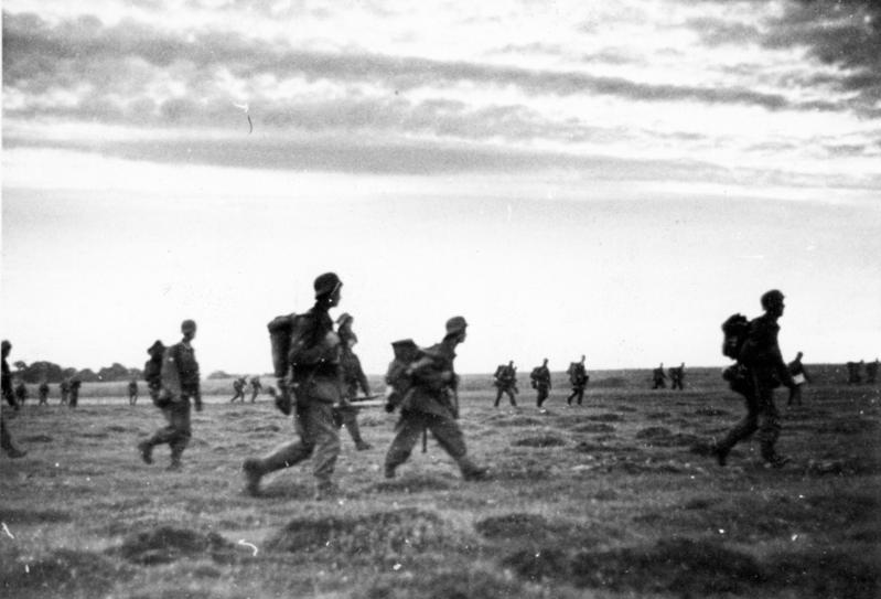 Heeresfilmstelle, Bildarchiv Gebirgs-Jäger gehen im Morgengrauen über die deutsch-russische Interessengrenze. 8./Geb.Jg.Regt.99 Aufnahme am: 22.6.41 Ort: 2km. westl. Zabiala, Abschnitt Lemberg, Land: Russland Bildberichter: König